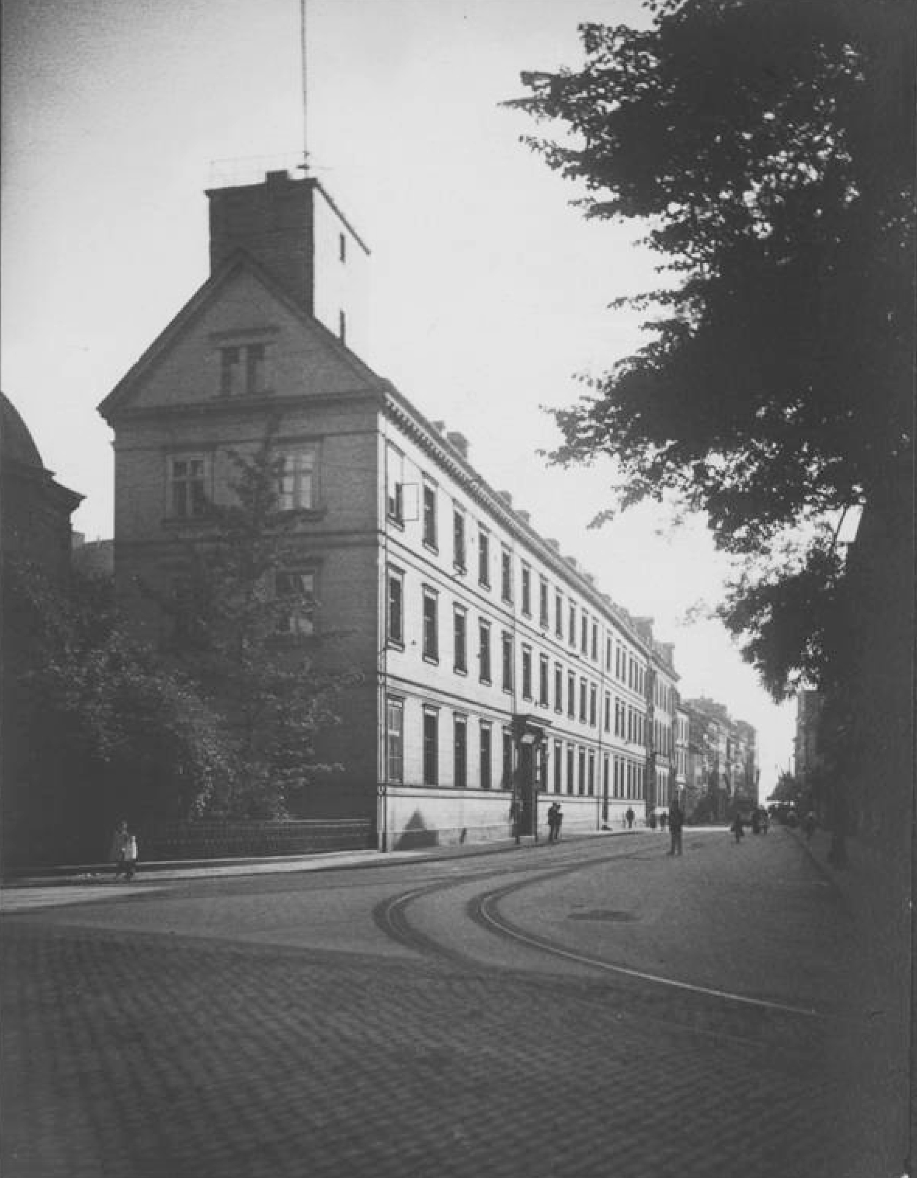 Düsseldorf, Mühlenstraße mit altem Regierungsgebäude, Einzelbilder vom Niederrhein (544), Erwin Quedenfeldt, 1911.